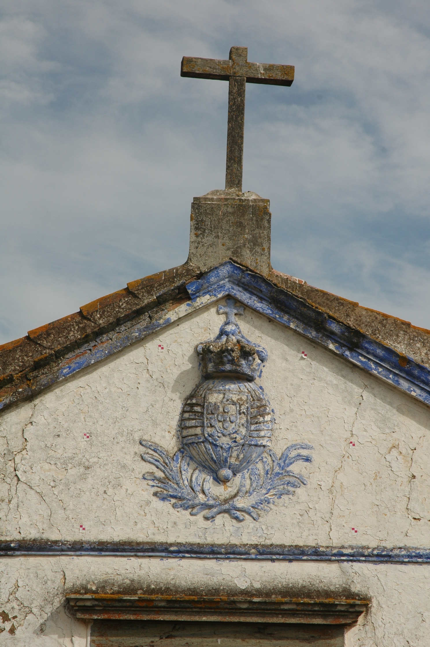 Frontão da capela do Monte Roncão d'El Rei